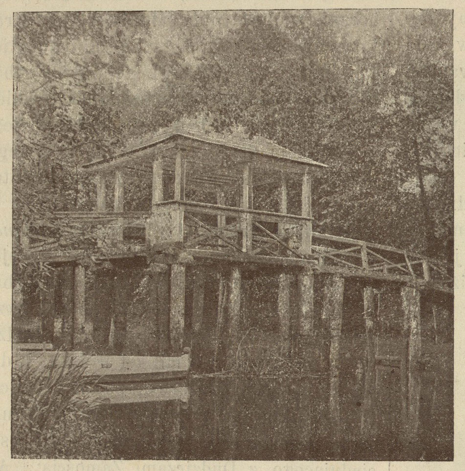 Беларуская (тарашкевіца): Дудзічы (Dudzičy), альтанка над ракою Пціч (Pcič)